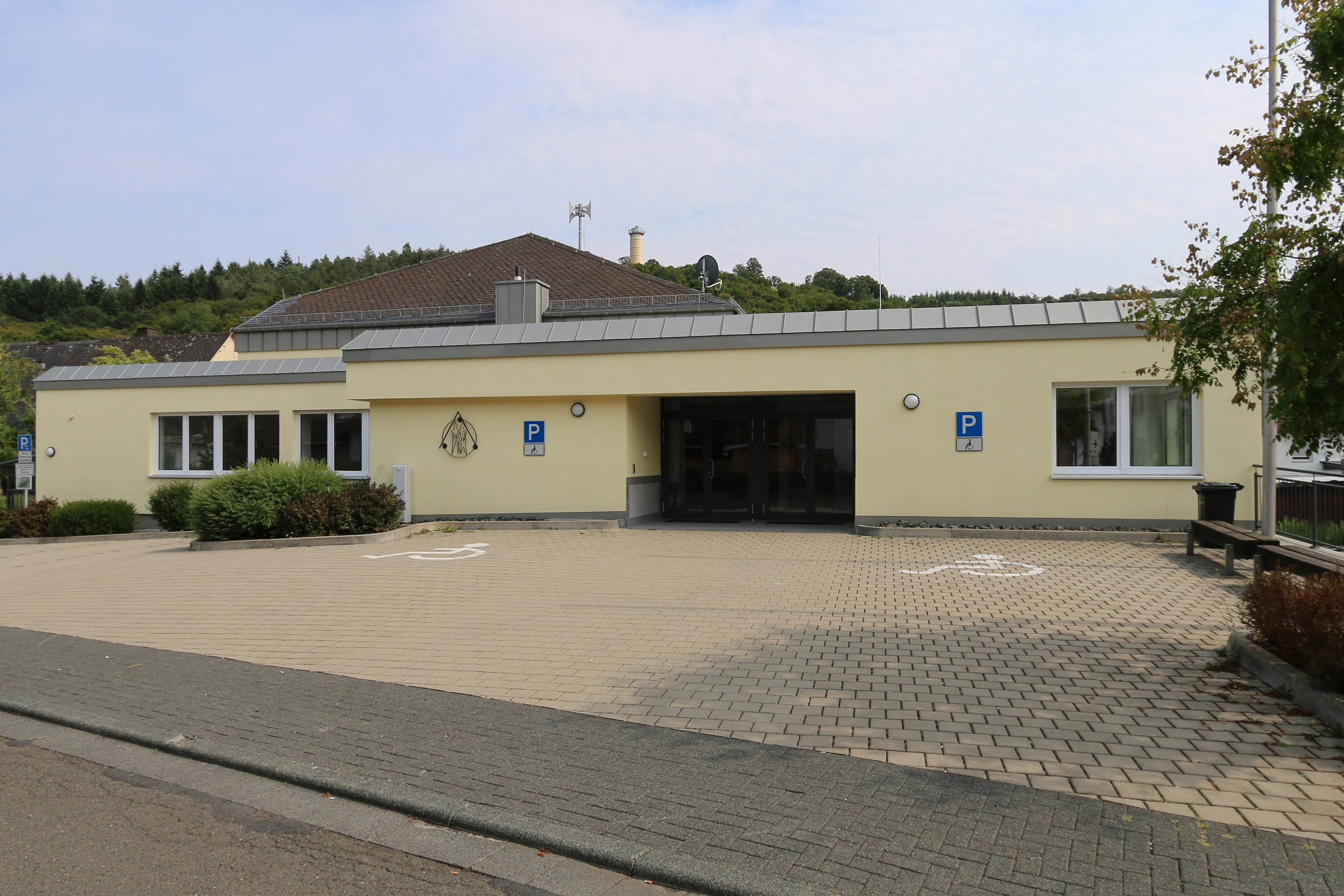 Herborn-Merkenbach, Lahn-Dill-Kreis: Dorfgemeinschaftshaus